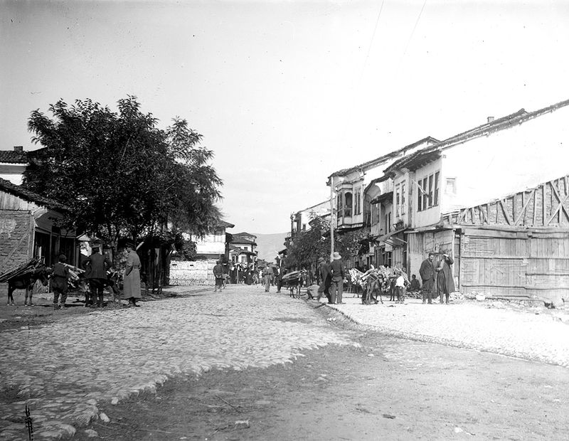 Струга през август 1916 година.